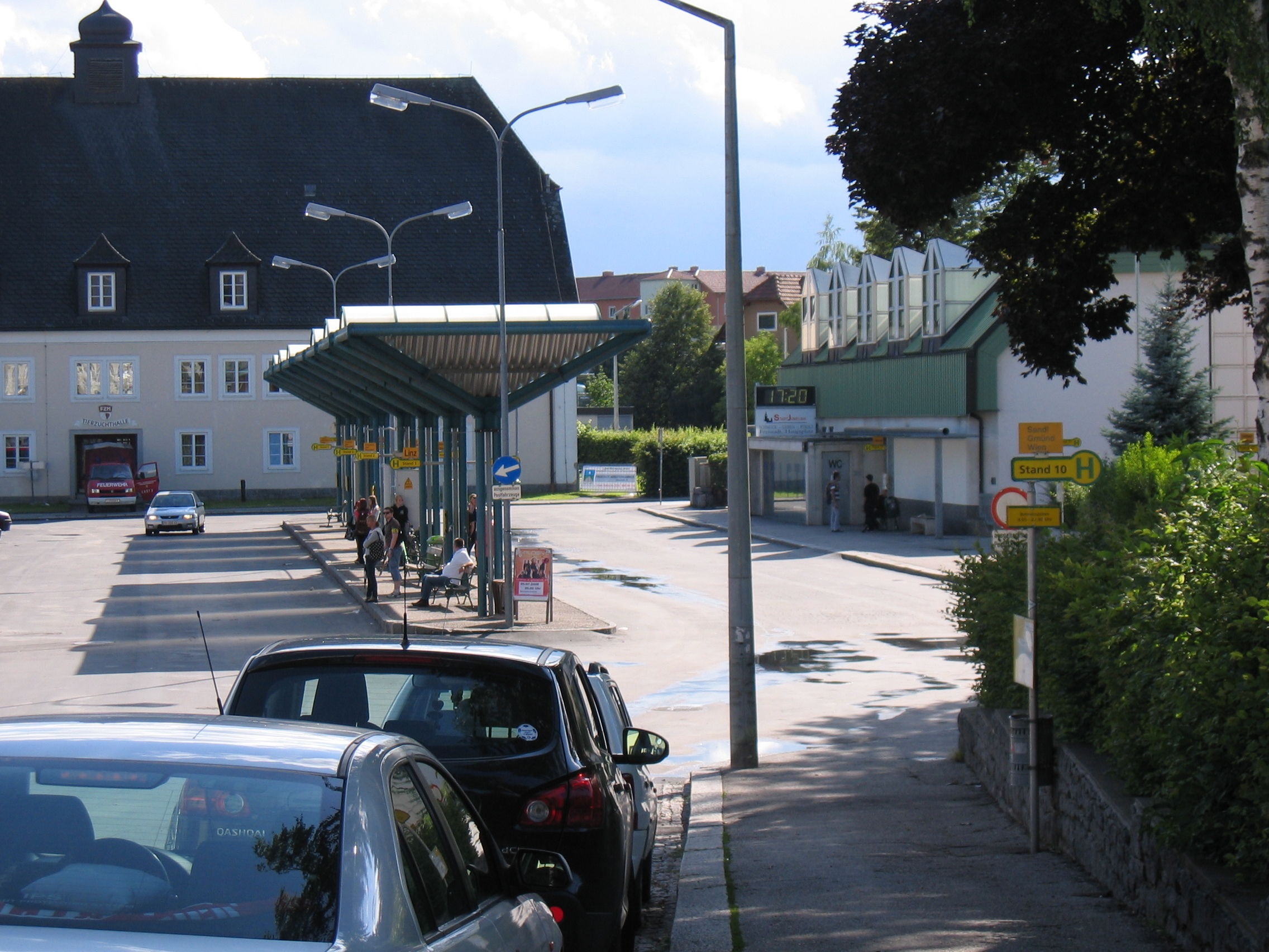 Stifterplatz - zentrale Öffi-Knotenpunkt